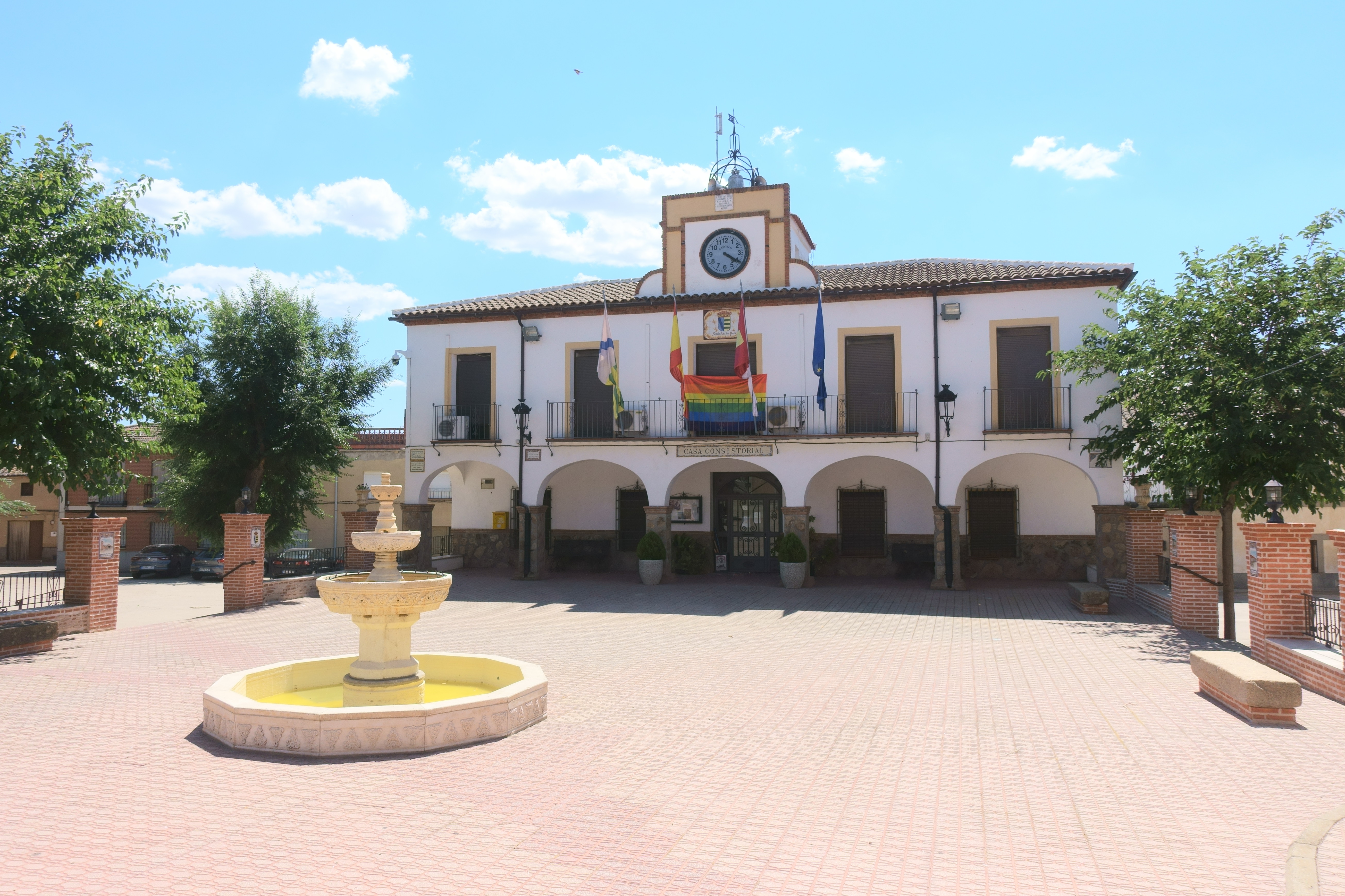 Casa consistorial de Santa Ana de Pusa (Toledo, España).